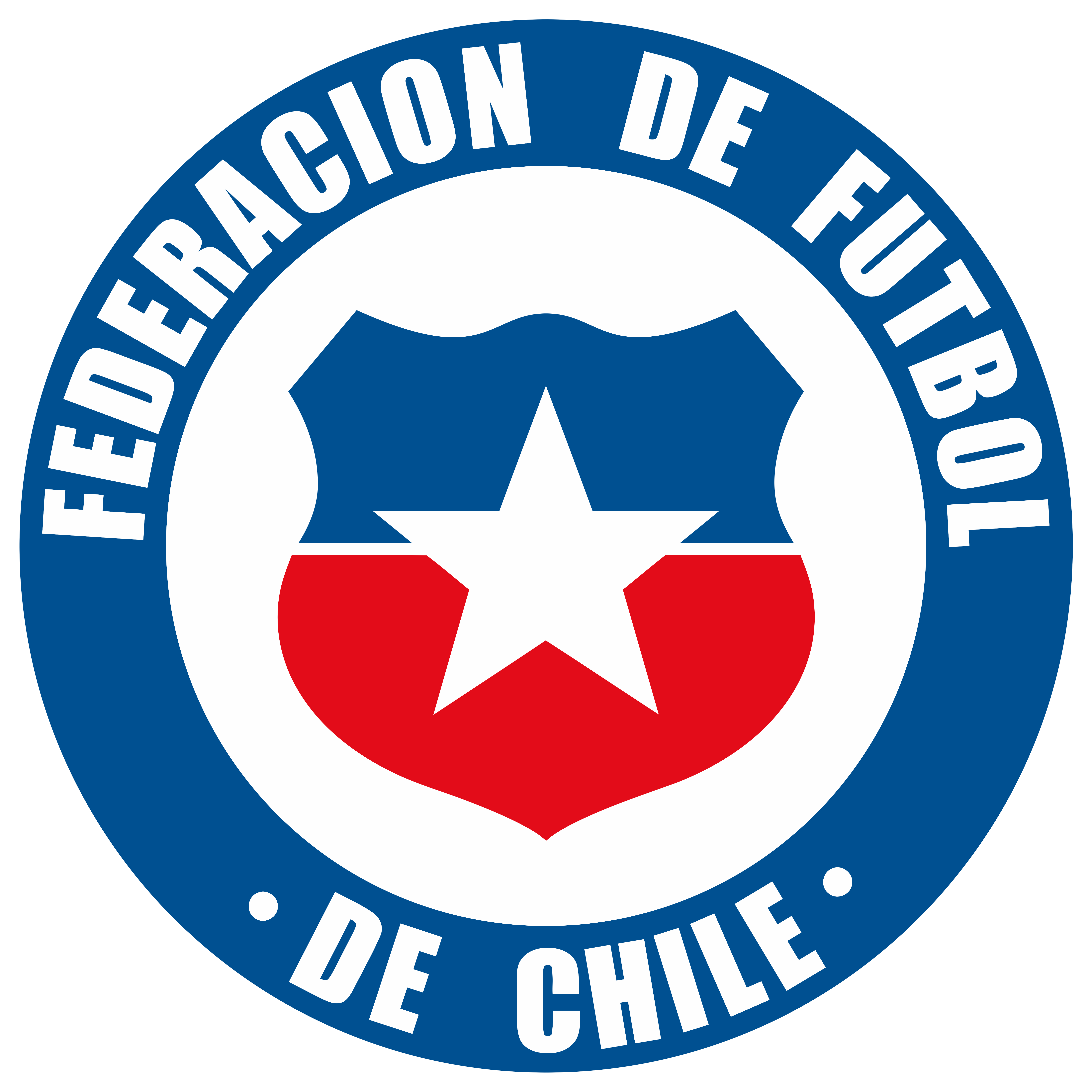 Escudo de la Federación de Fútbol de Chile